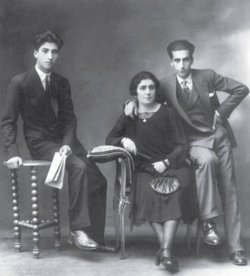 Os dous irmáns. Xaquín Lorenzo Fernández e Xurxo Lorenzo Fernández coa súa nai Joaquina Fernández Barcia, c. 1930